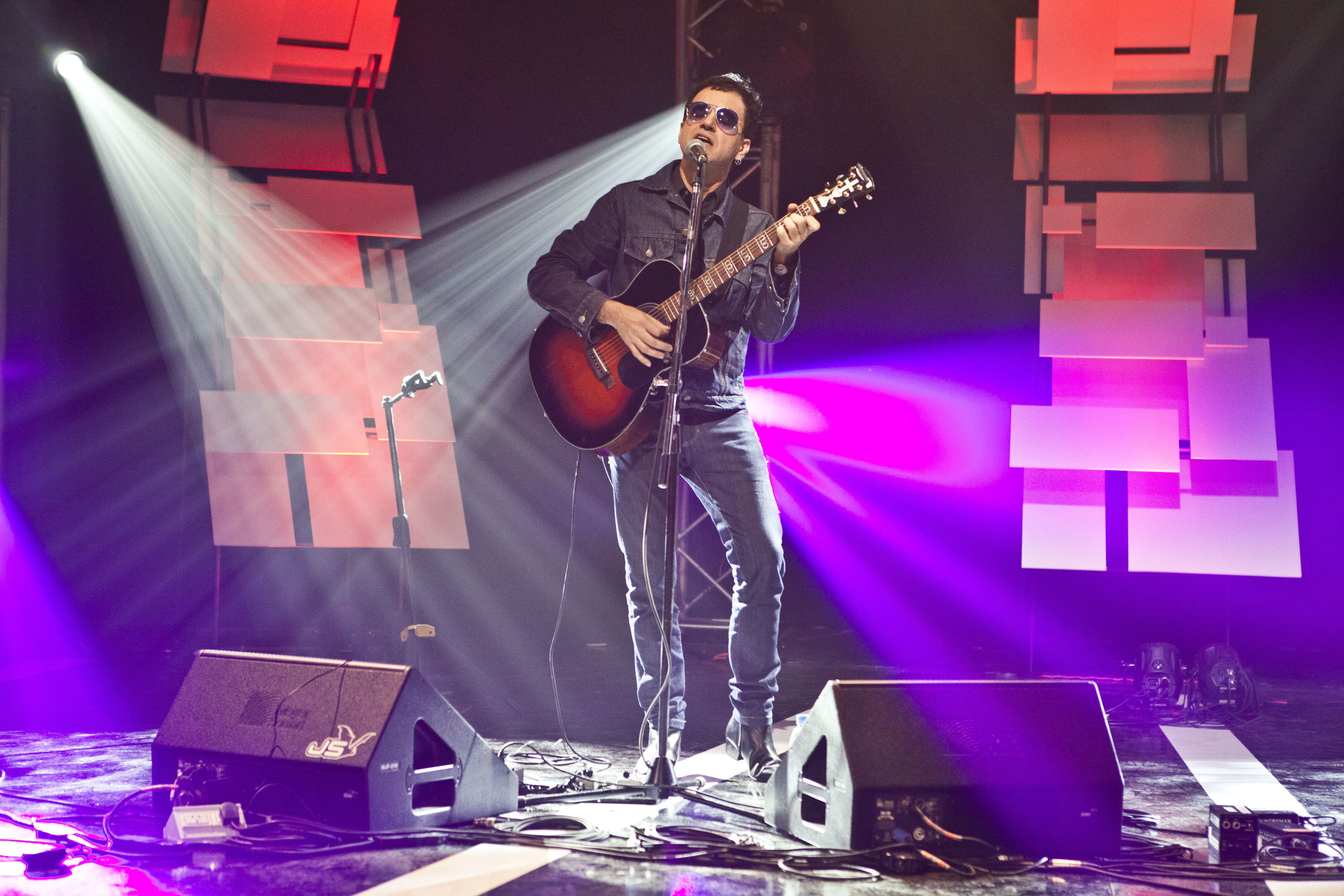 Richard Coleman en vivo, 2014.